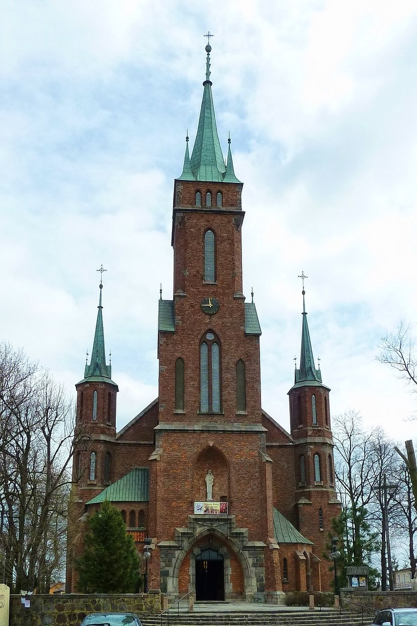 Kościół pw. Matki Boskiej Częstochowskiej w Baboszewie.